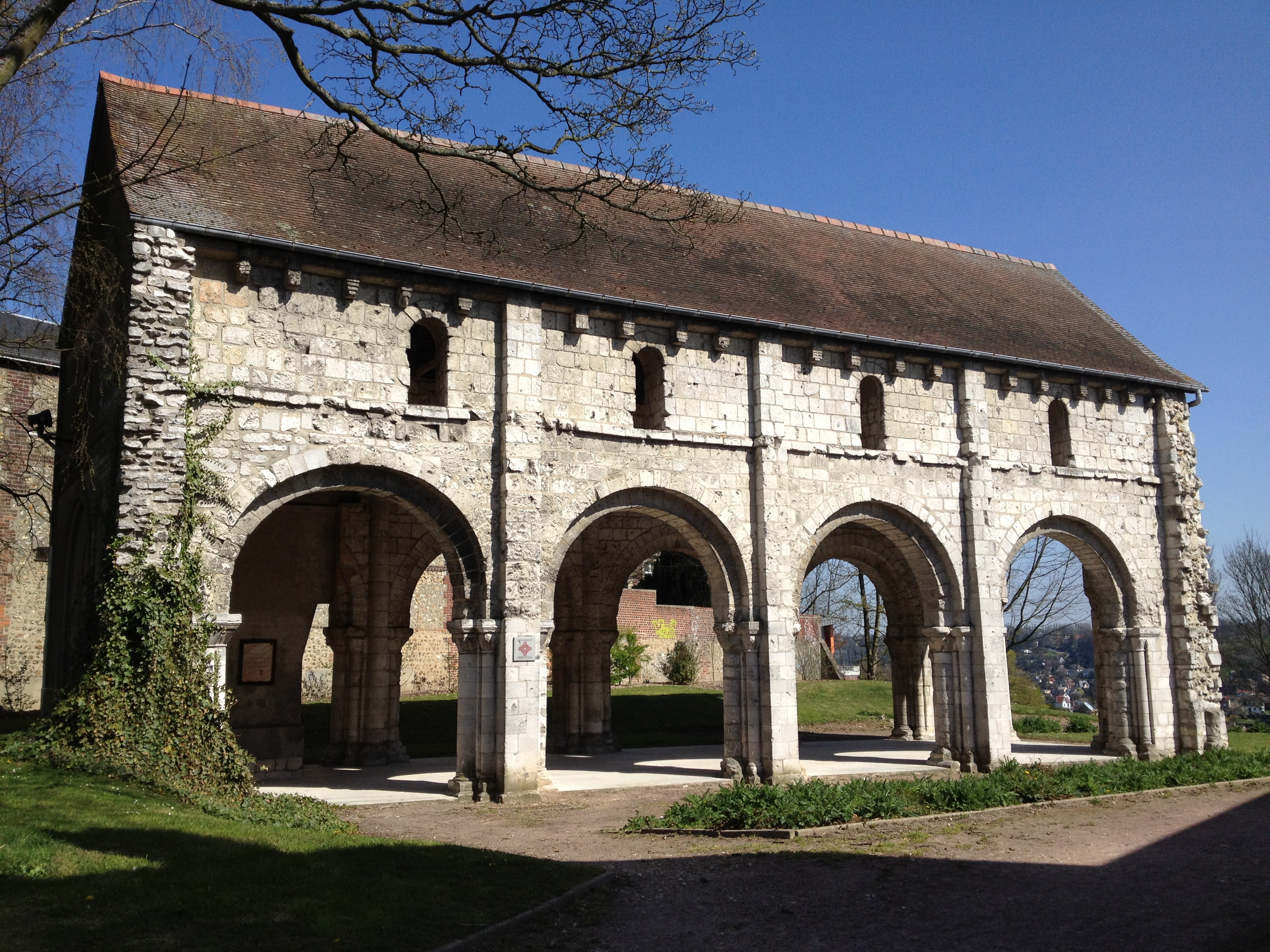 Ancienne église Saint-Jacques-du-Mont-aux-Malades.